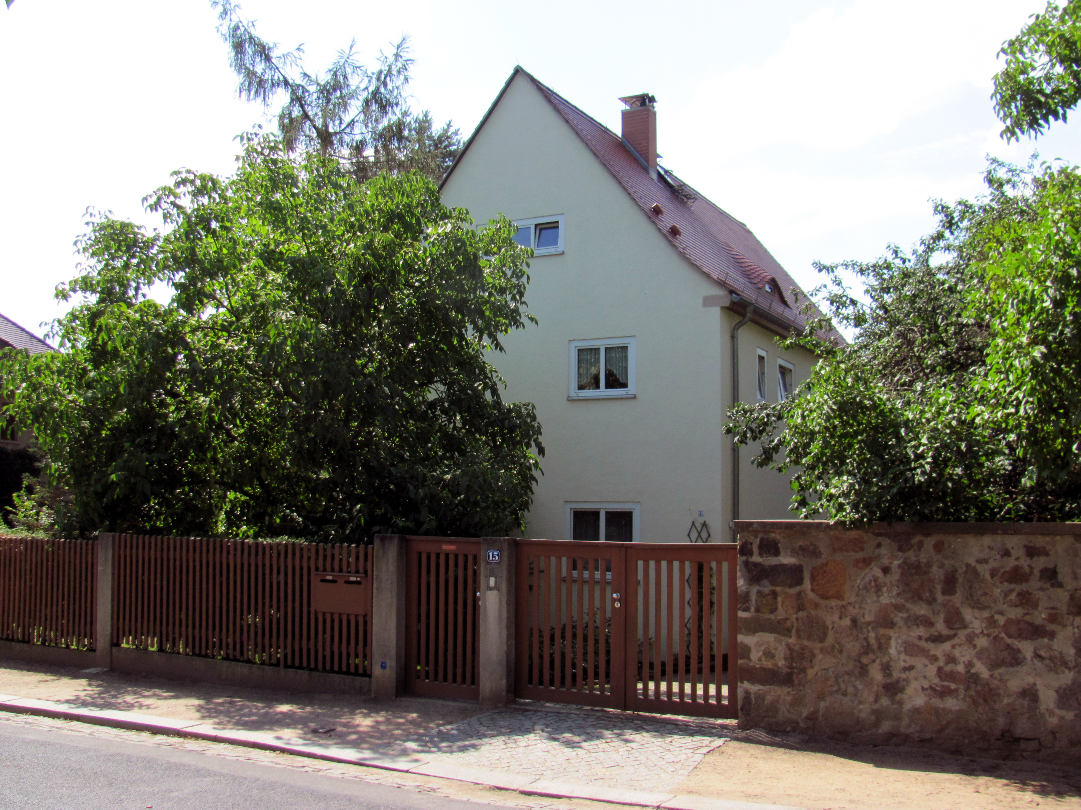 Radebeul-Serkowitz, Wohnhaus Friedrich Rötschke